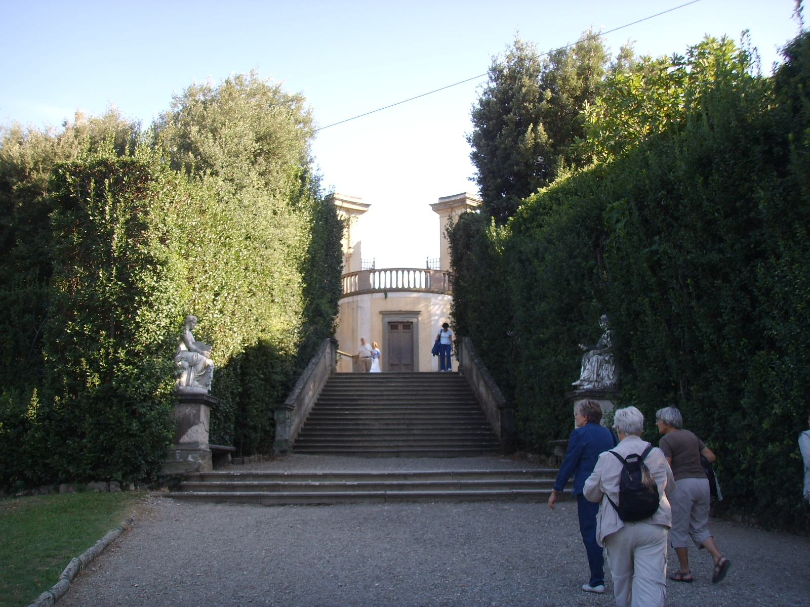 Boboli, imbocco della scalinata verso la rampa per il giardino del cavaliere